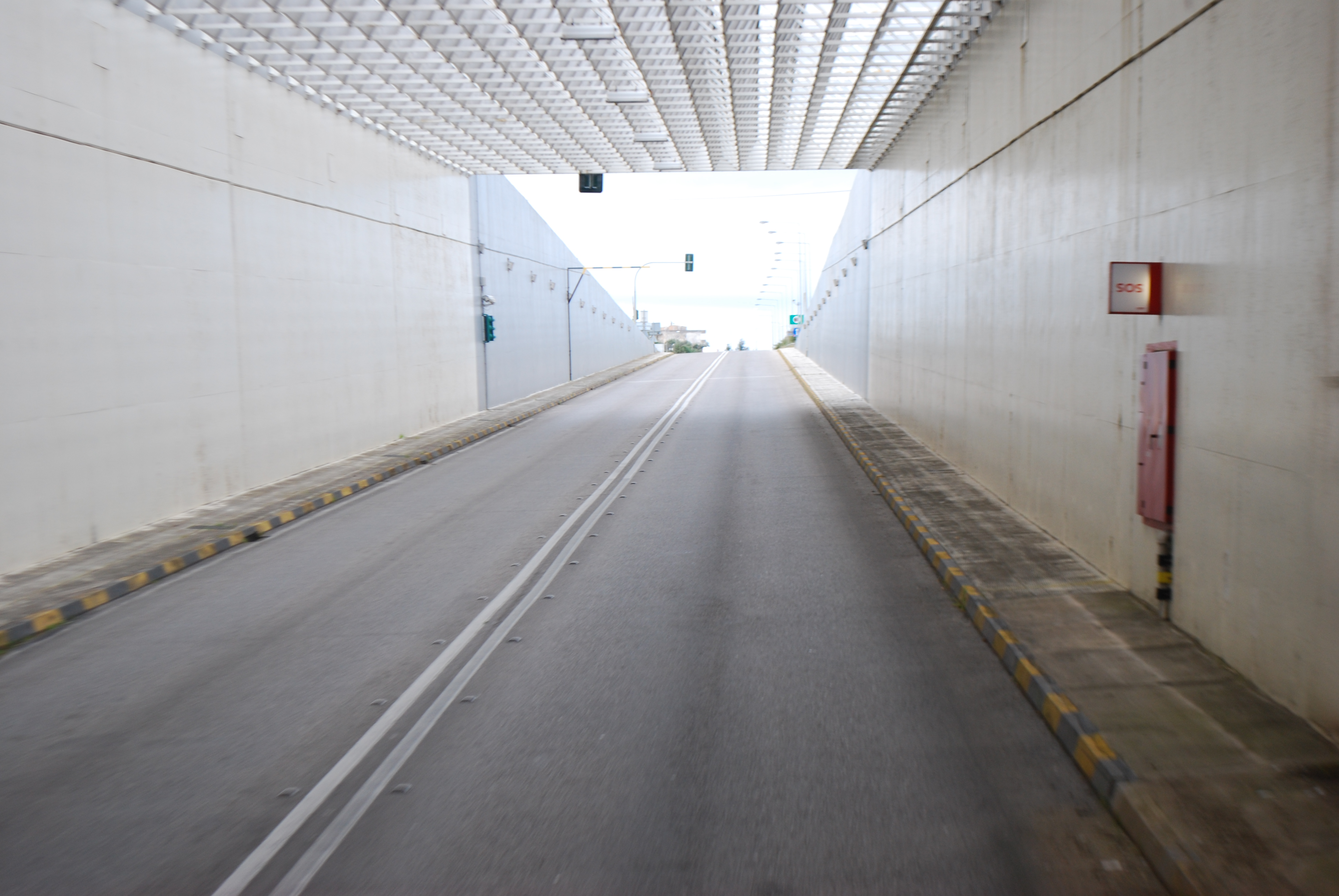 Vue du tunnel sous-marin Actio-Preveza.